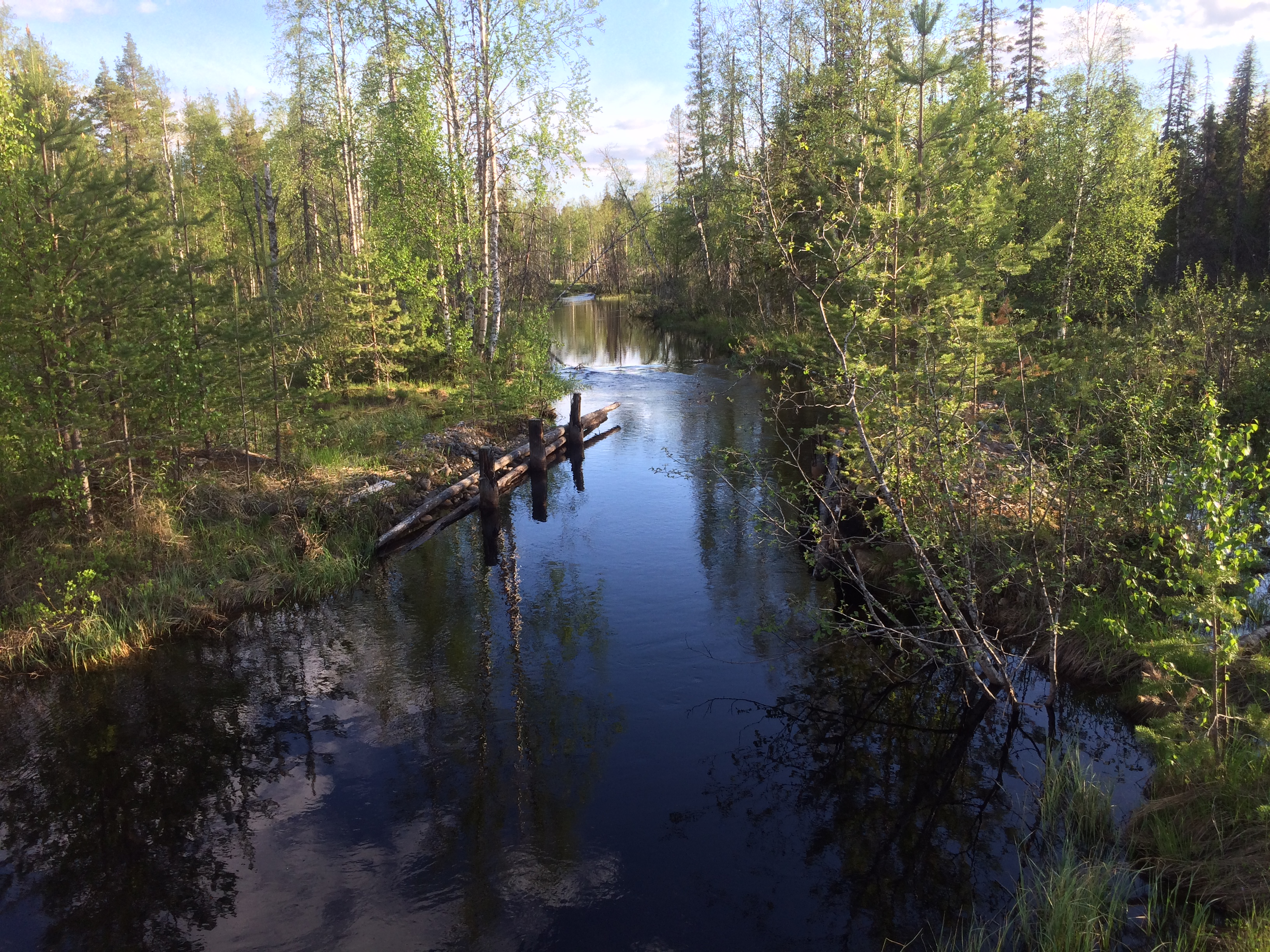 р. Кивийоки (приток Шурийоки)